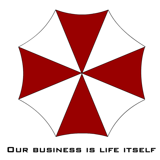 Лого на Амбрелла Корпорейшън нарисувано на Флаш 8 от мен. Logo of Umbrella Corporation. I draw it on Flash 8. No copyright alert, please!